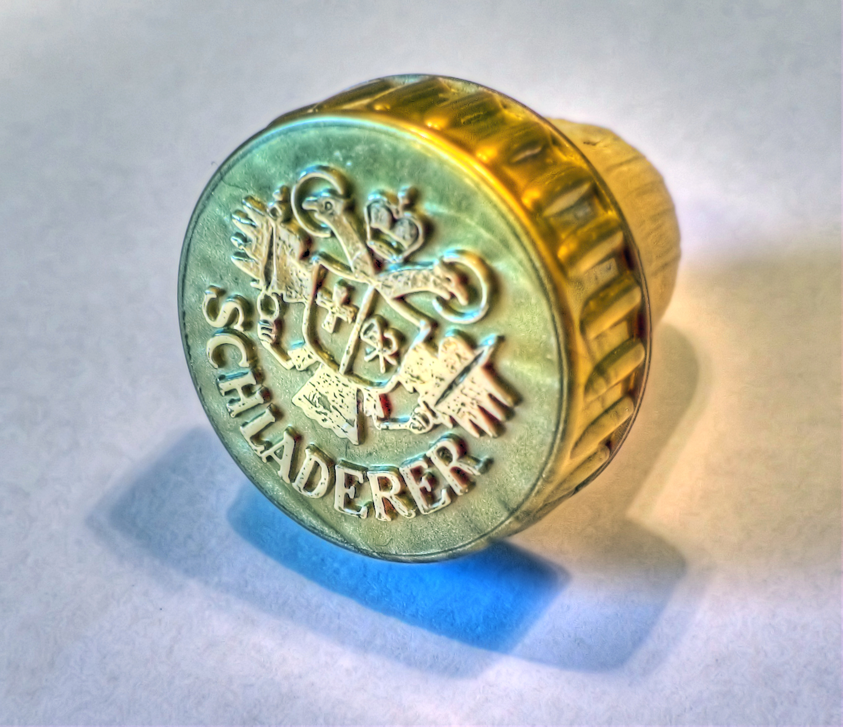 Schladerer Korkenverschluss